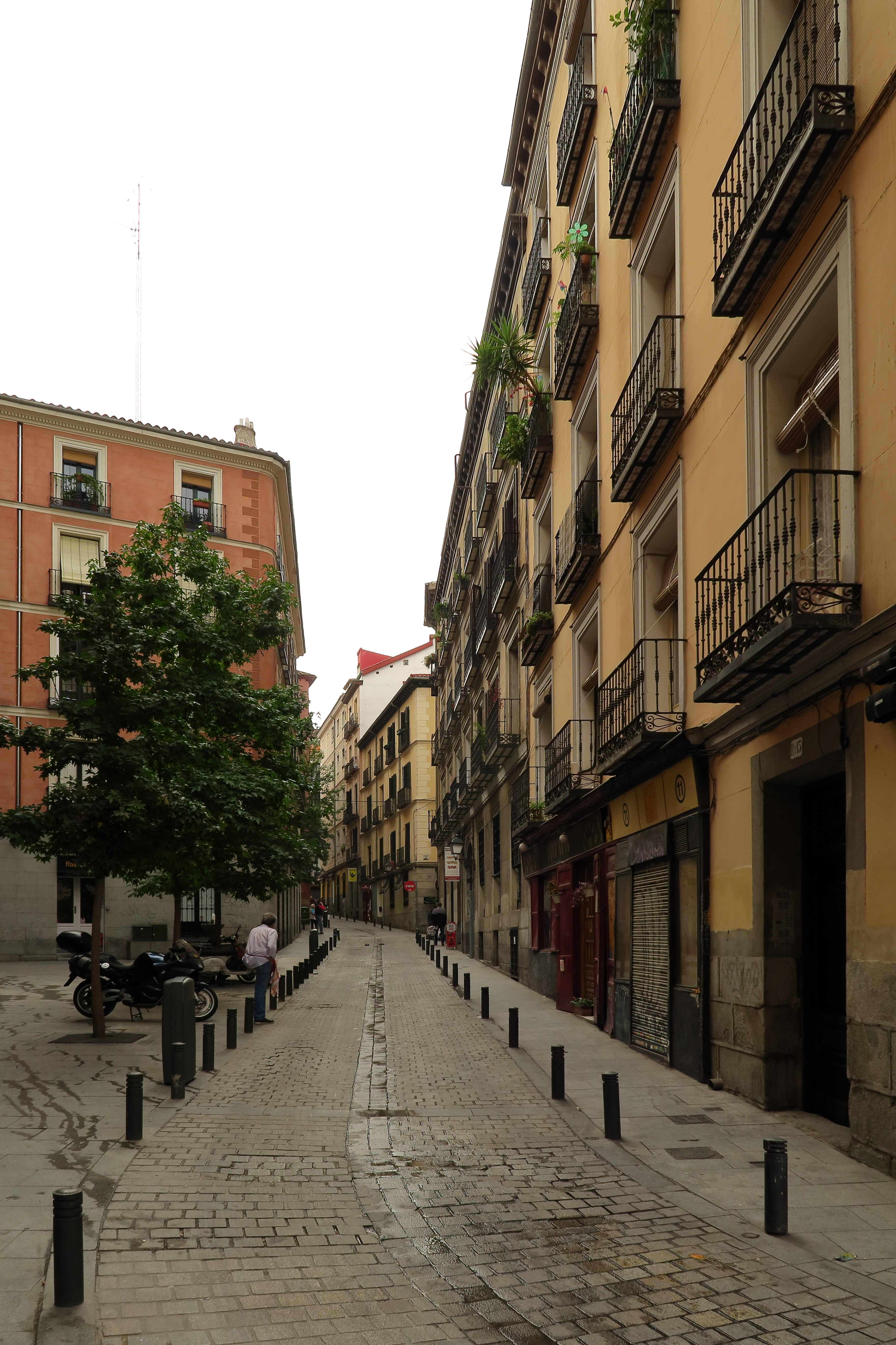 Calle del Espejo, desde número 11